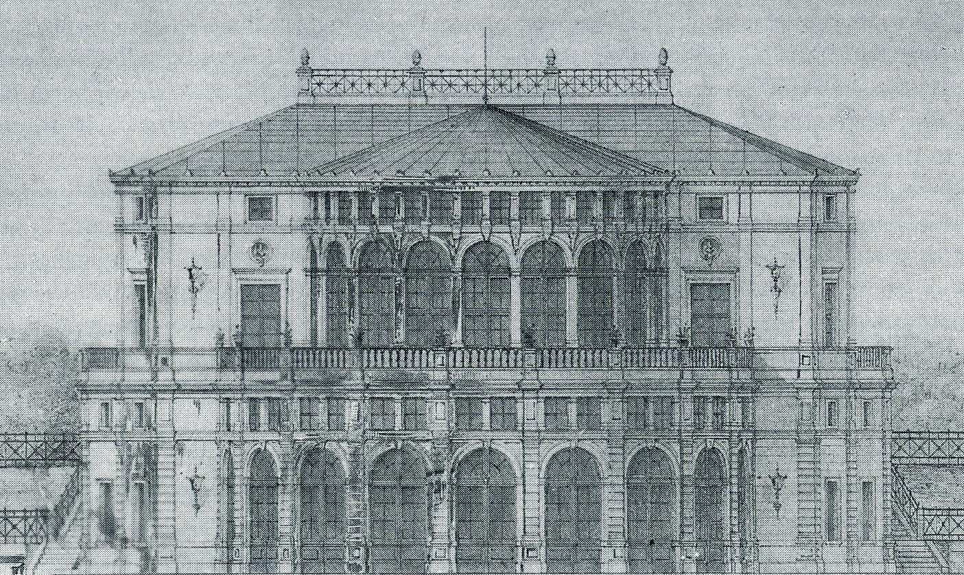 Dresden Viertes Belvedere, Entwurf von Otto von Wolframsdorff